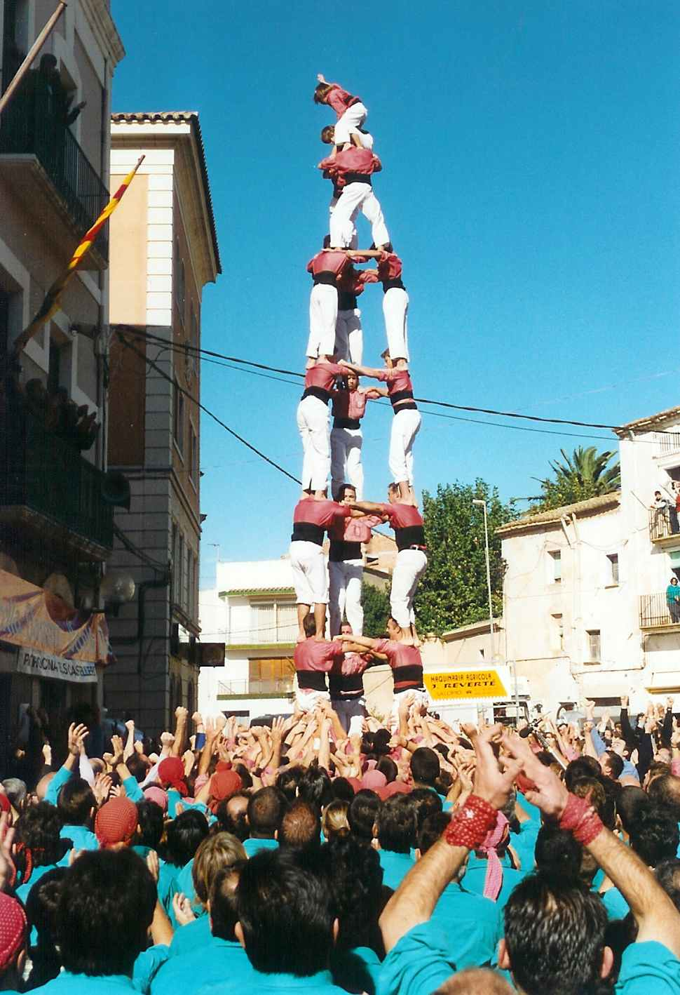 3 de 8 aixecat per sota de la Colla Vella dels Xiquets de Valls. Vila-rodona, 7 de novembre de 1999.